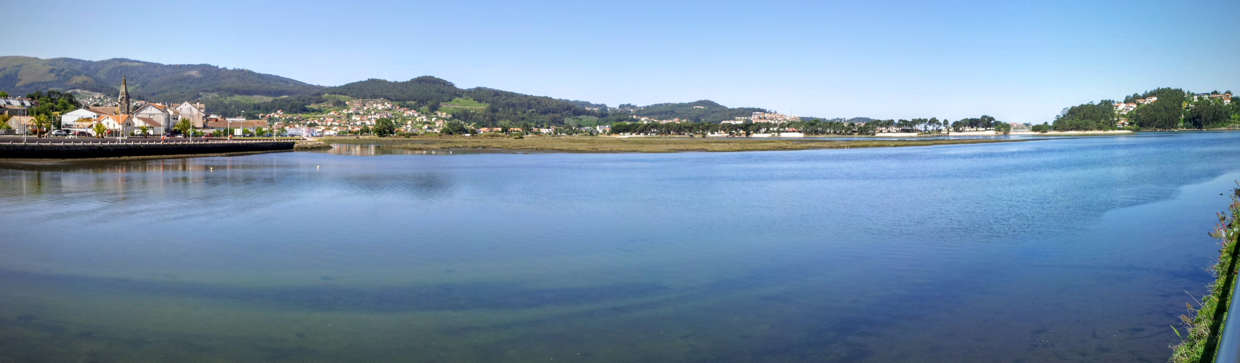 𐌲𐌿𐍄𐌹𐍃𐌺: Desembocadura del Río Miñor en La Ramallosa (Nigrán)